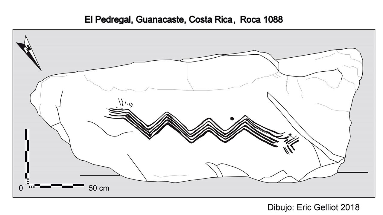 Drawing of the 1088's boulder in the Pedregal